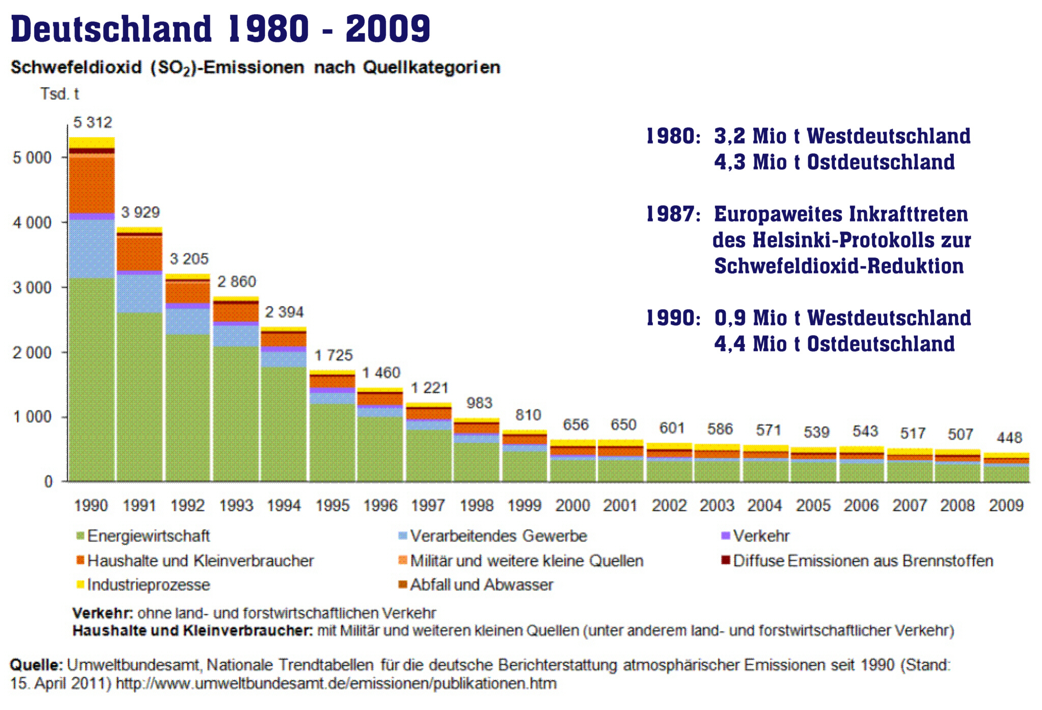 Reduktion der deutschen Schwefeldioxid-Emissionen 1980-2009